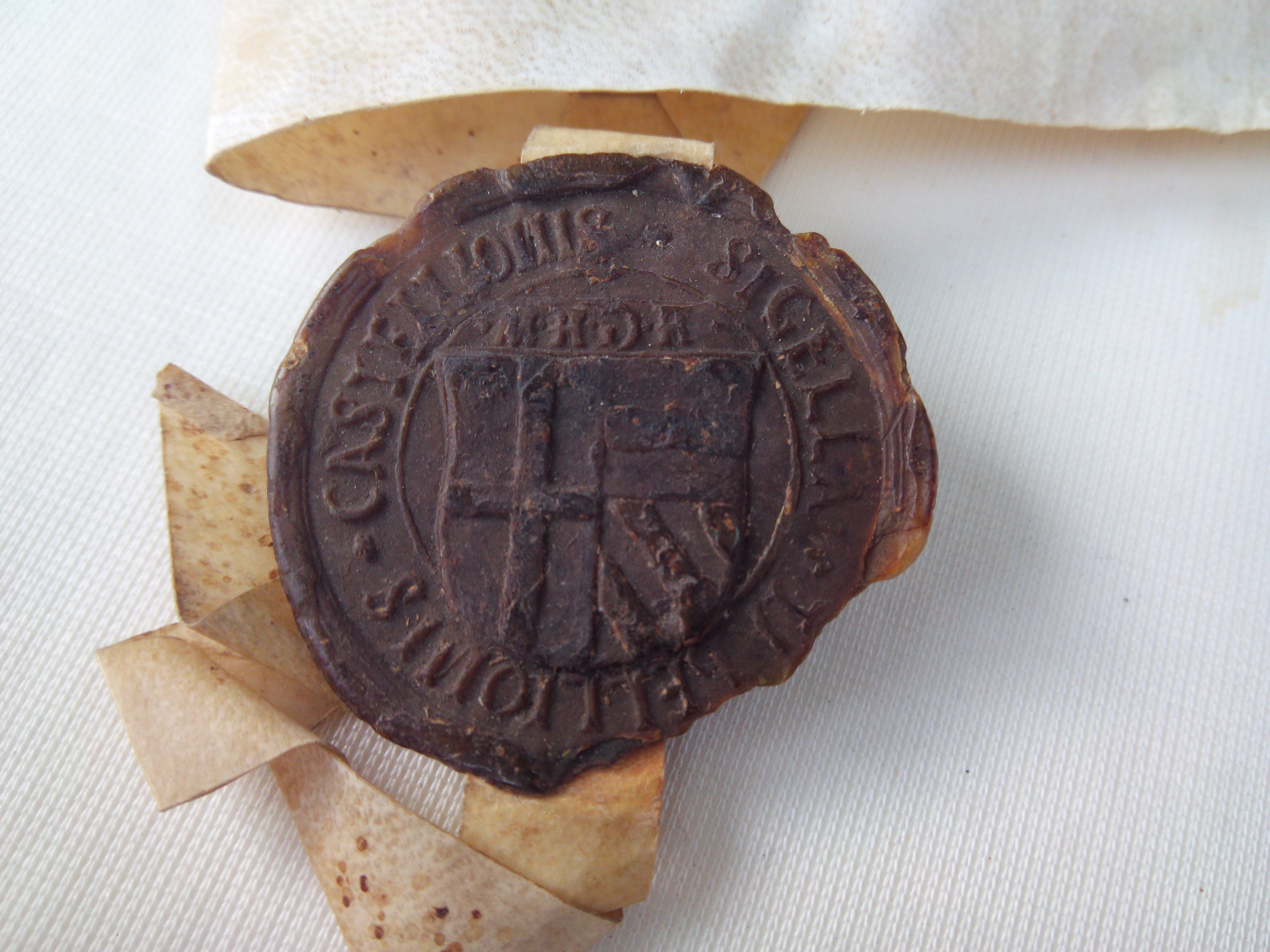 Sceau d'un parchemin de la seigneurie de Châtillon-sous-Maîche.